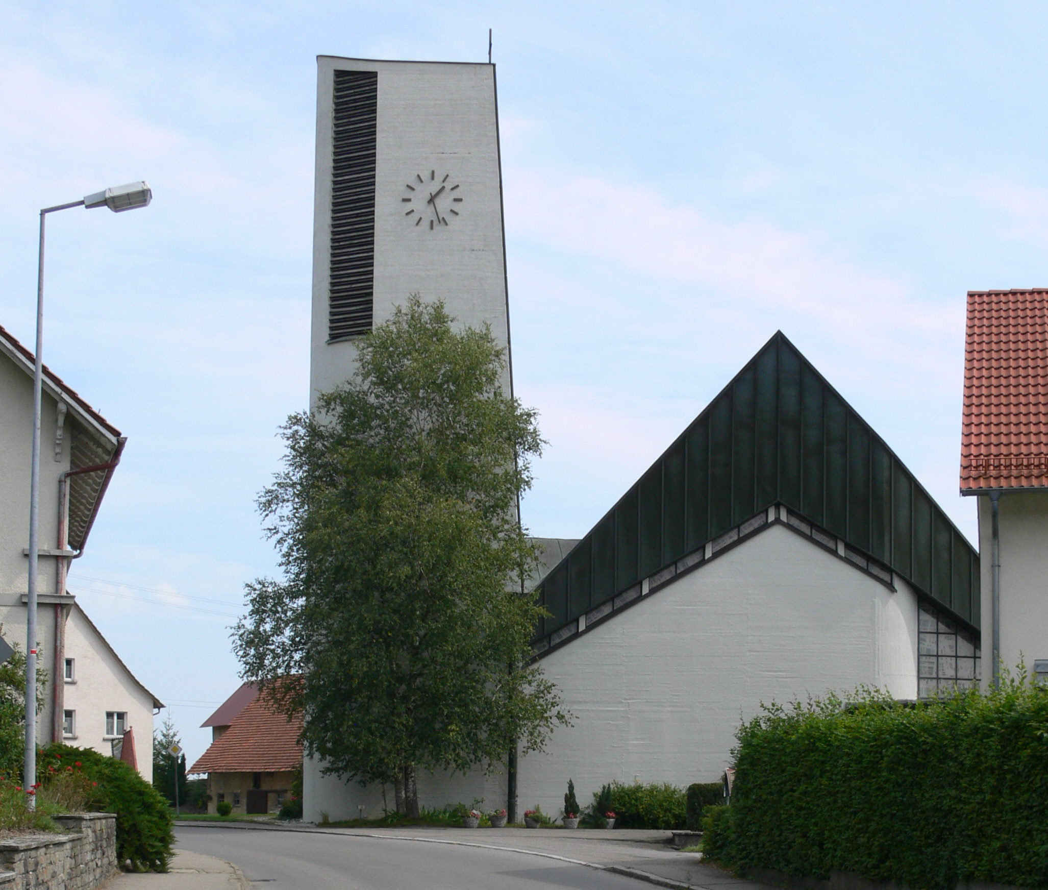 Katholische Pfarrkirche St. Felix und Regula, Zogenweiler, Gemeinde Horgenzell, Landkreis Ravensburg